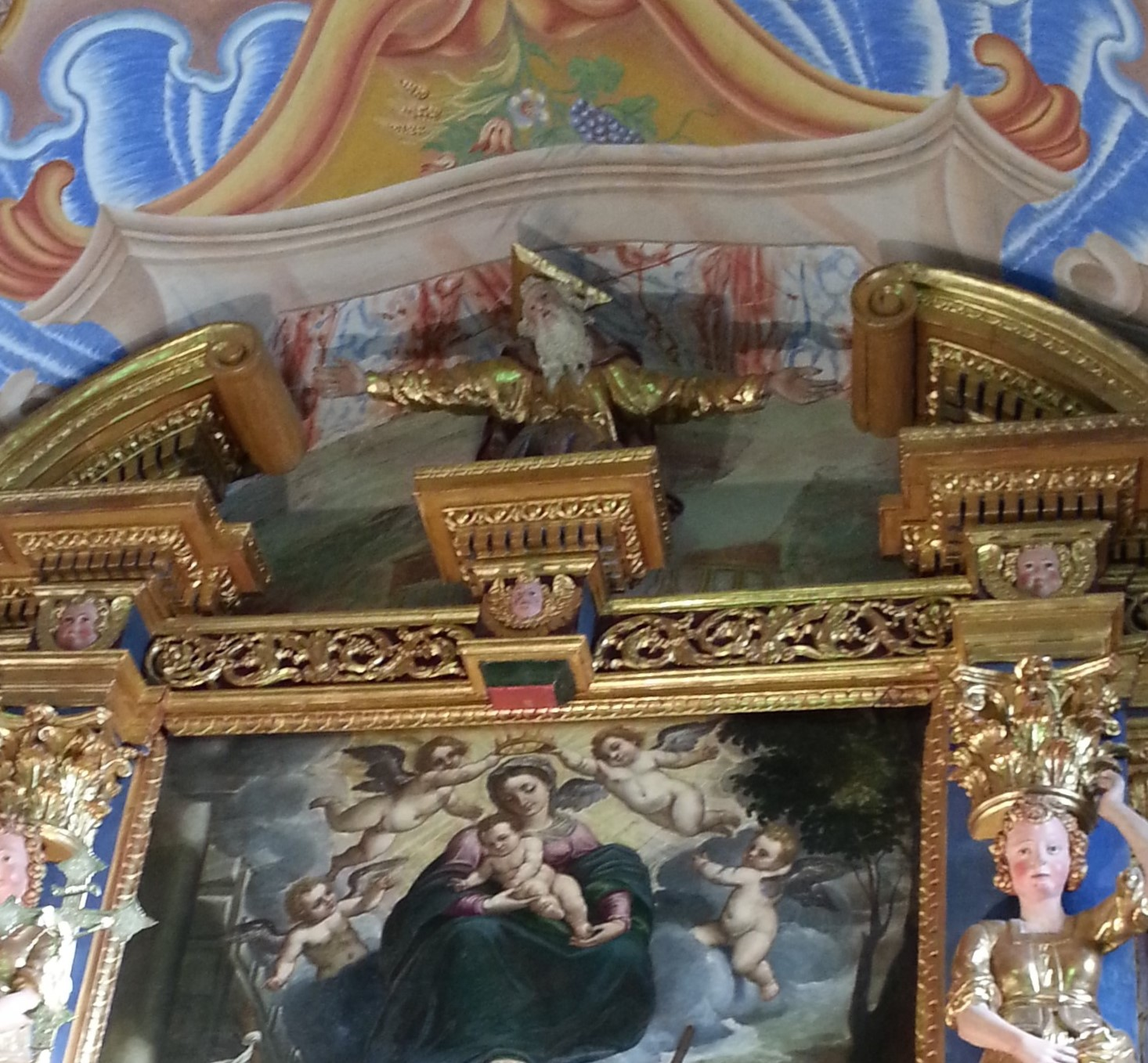 Madonna con Bambino e santi (Valgoglio) con particolare superiore